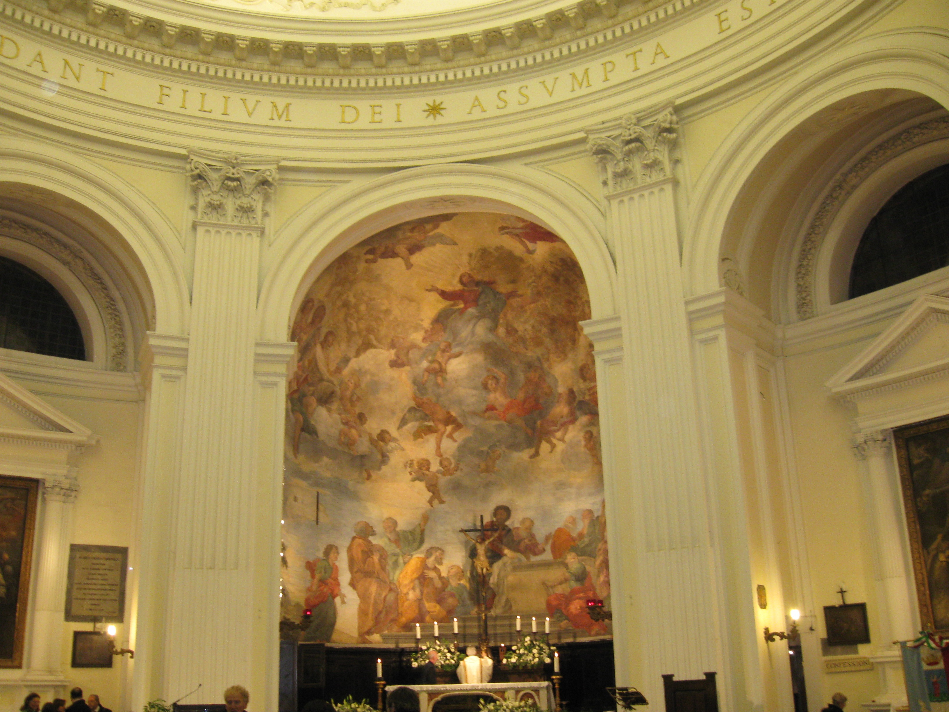 L'abside della Collegiata di Santa Maria Assunta ad Ariccia (RM), con l'affresco di Jacques Courtois detto il Borgognone raffigurante l'Assunzione di Maria.